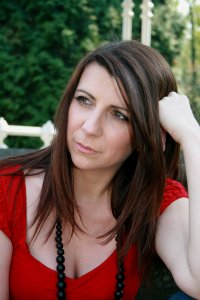 Muriel Targnion, députée communautaire et régionale